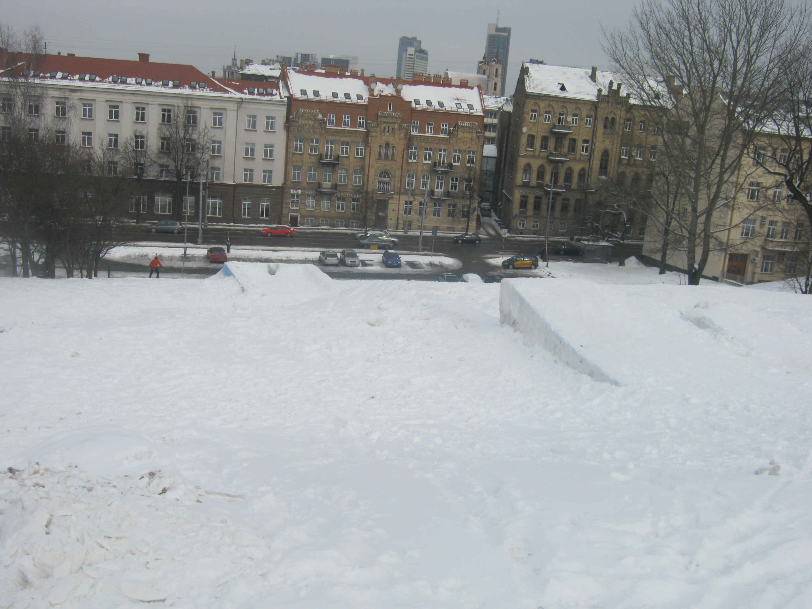 Tauro kalnas